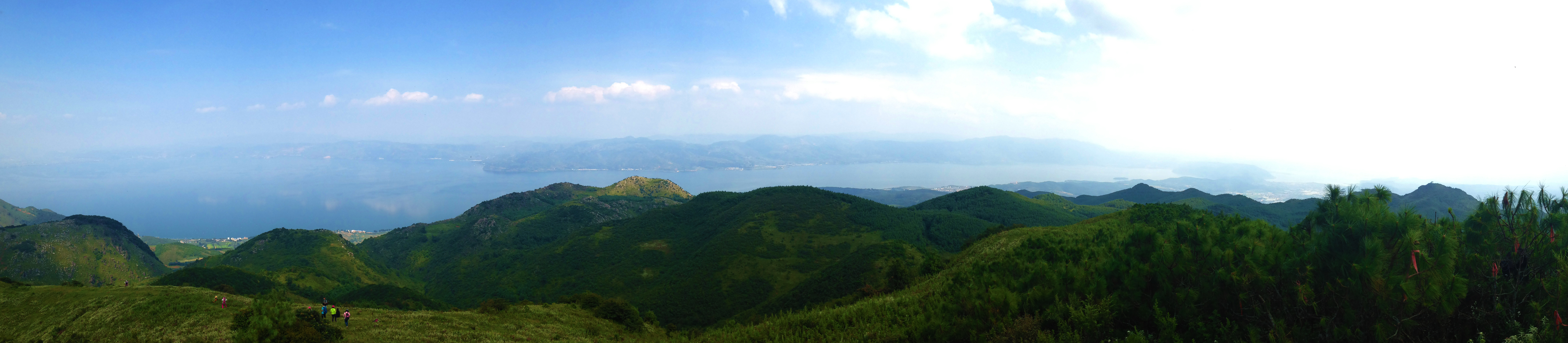 抚仙湖全景，拍摄于湖西岸，江川县与晋宁县交界的谷堆山大梁子。